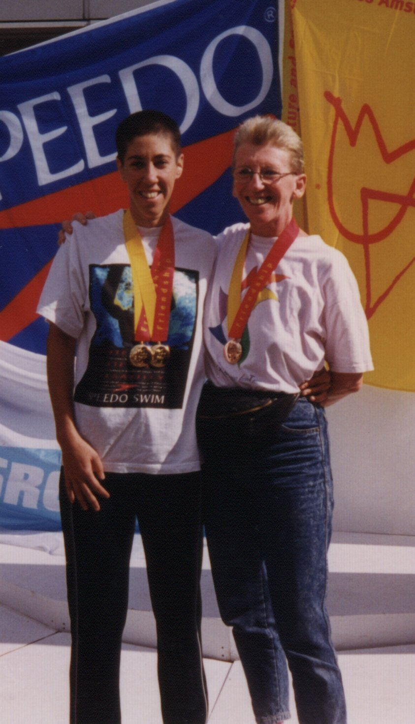 ברברה בקר (מימין) והדס סנדלר לאחר זכייתן במדליות הראשונות לישראל, 1998